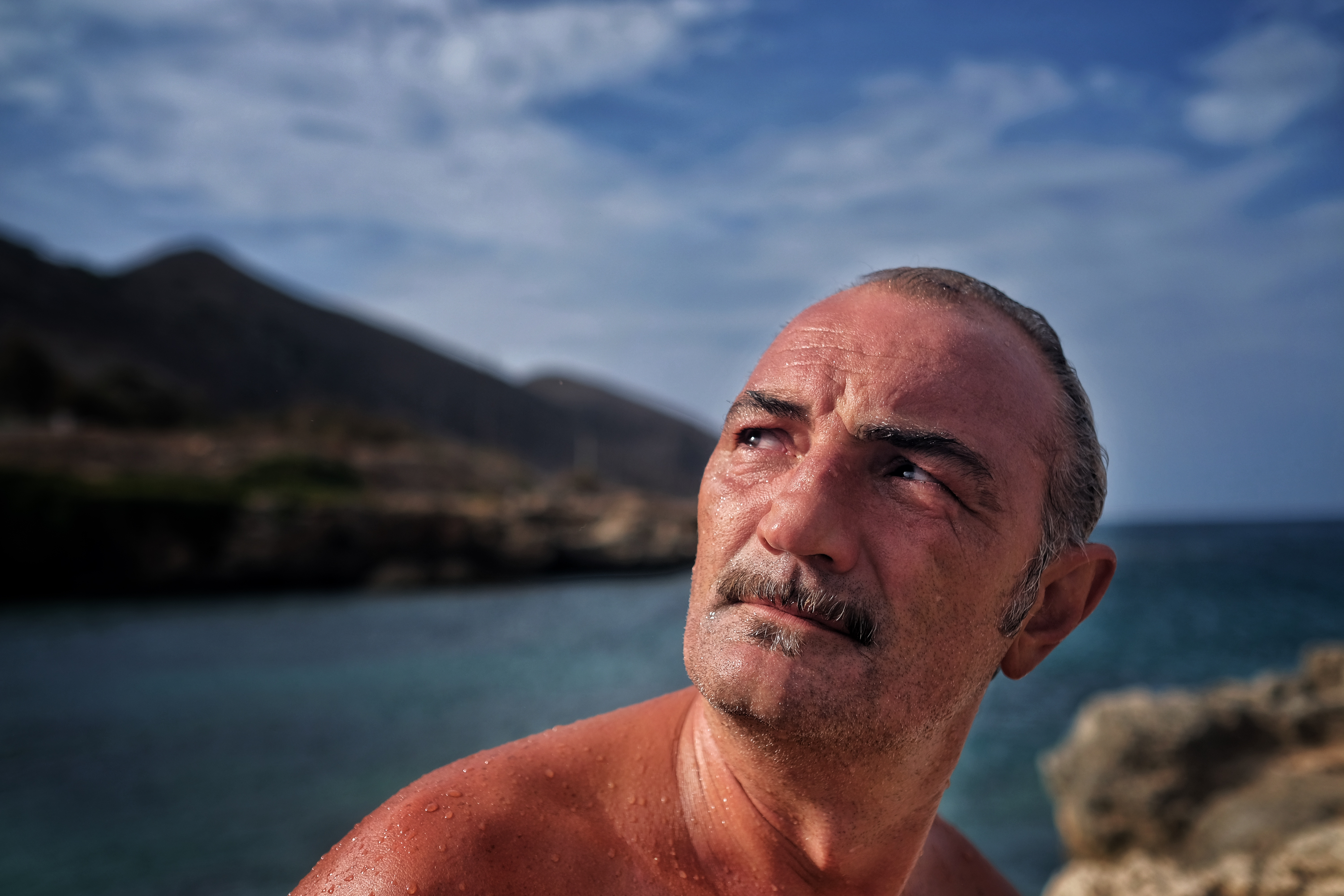 L'attore Raffaele Vannoli, ritratto sull'isola di Favignana (TP)